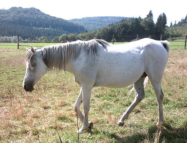 Araberstute, selbst fotografiert, 2004